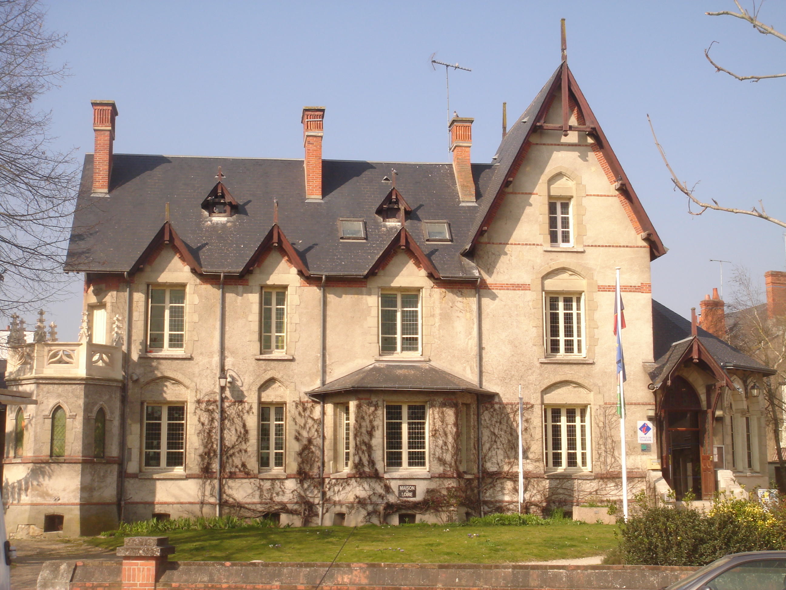 La Chanterie, Jargeau, Loiret, Centre, France. Maison de Loire et office du tourisme.